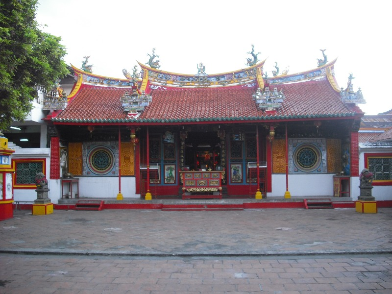 klenteng Kwan Im, Cirebon 2